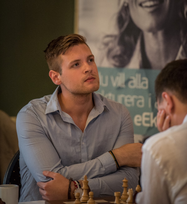 Jonathan Westerberg i Visma-turneringen 2016. Foto: Lars OA Hedlund